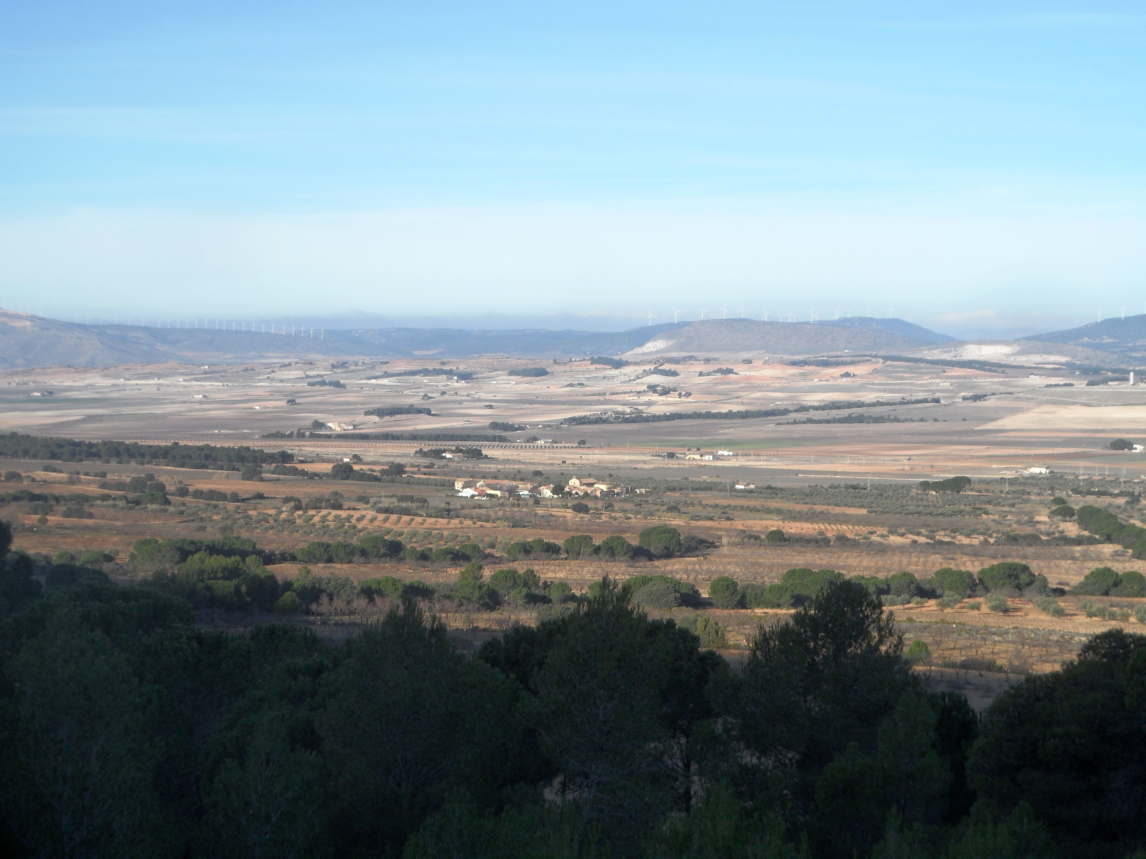 La vall dels Alforins des de l'Ombria de La Safra (Villena).